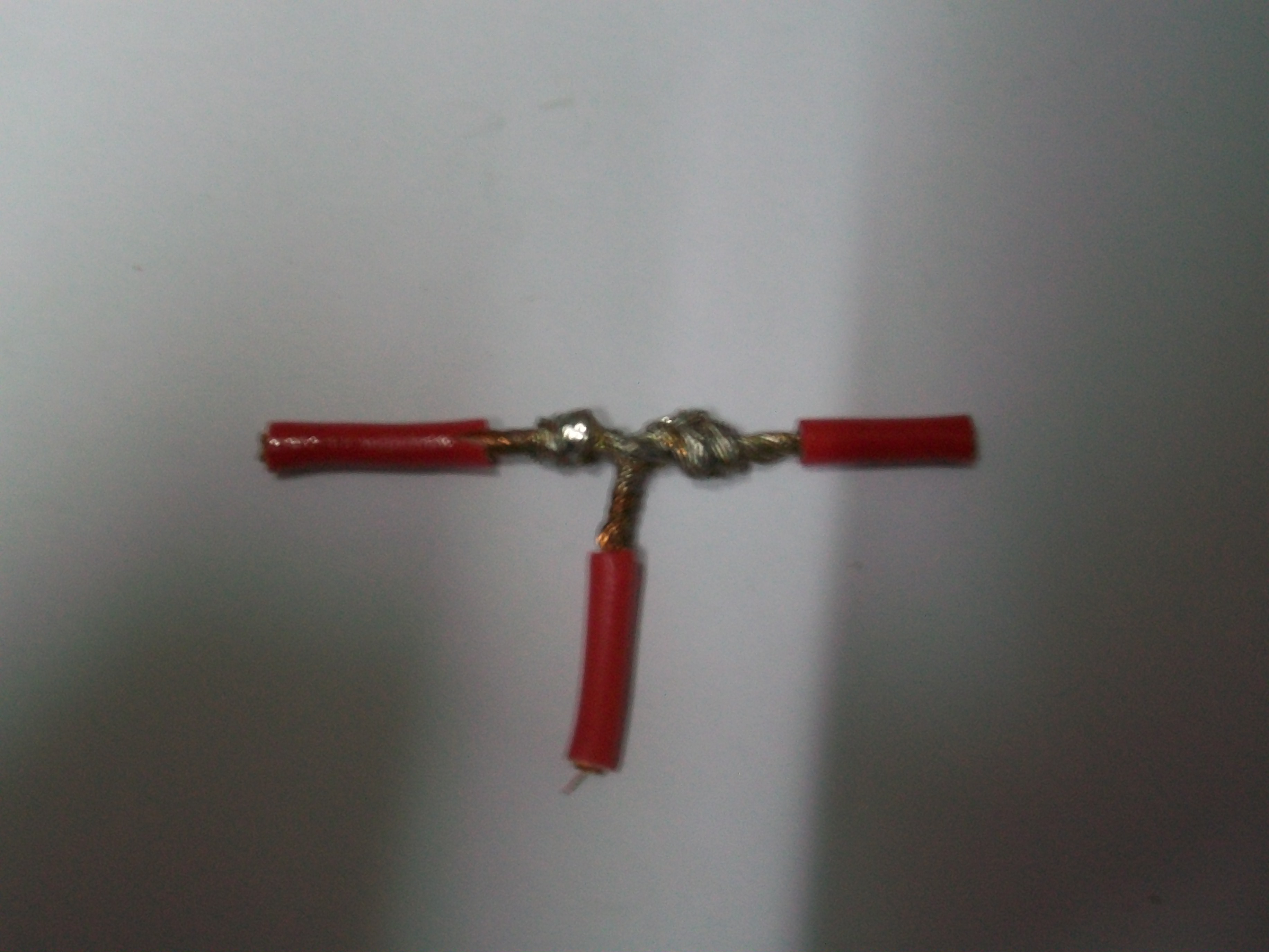 Forma de empalmar cables mediante estaño